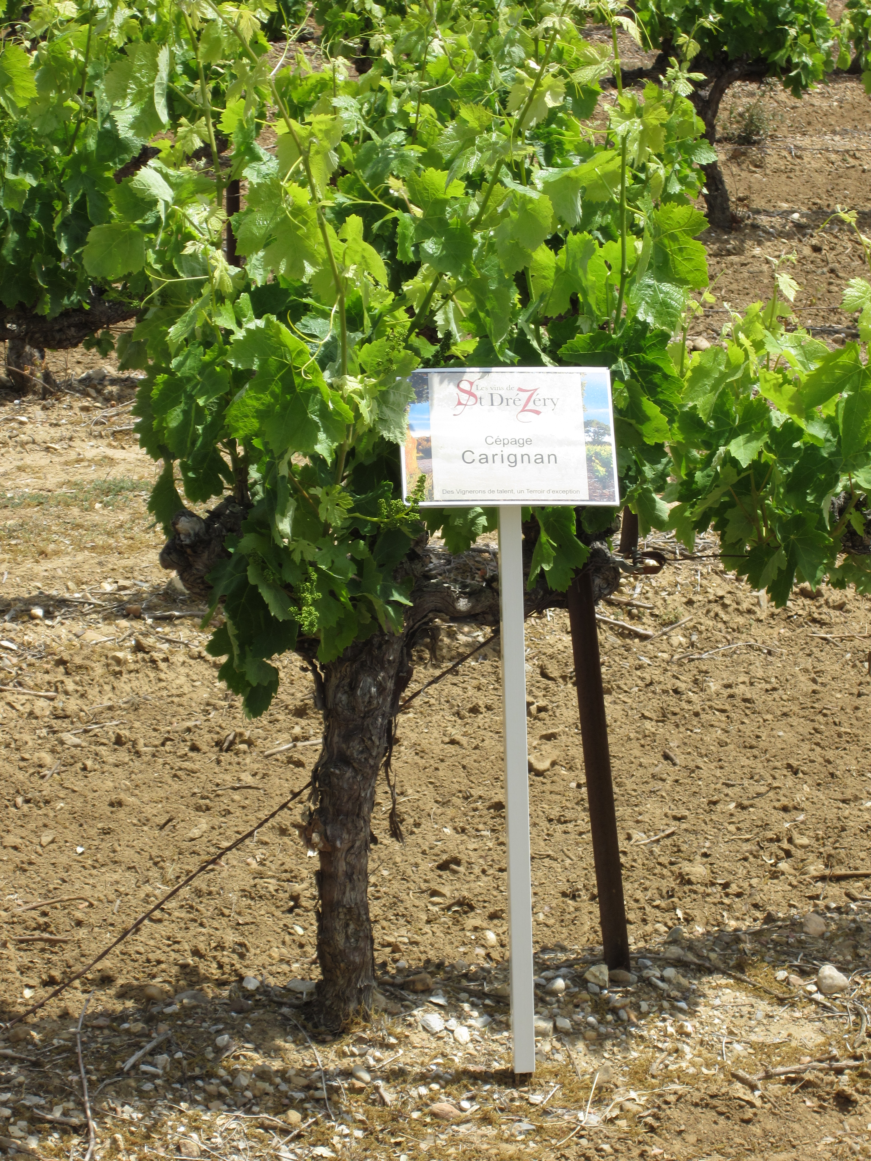 vigne carignan saint-drézéry